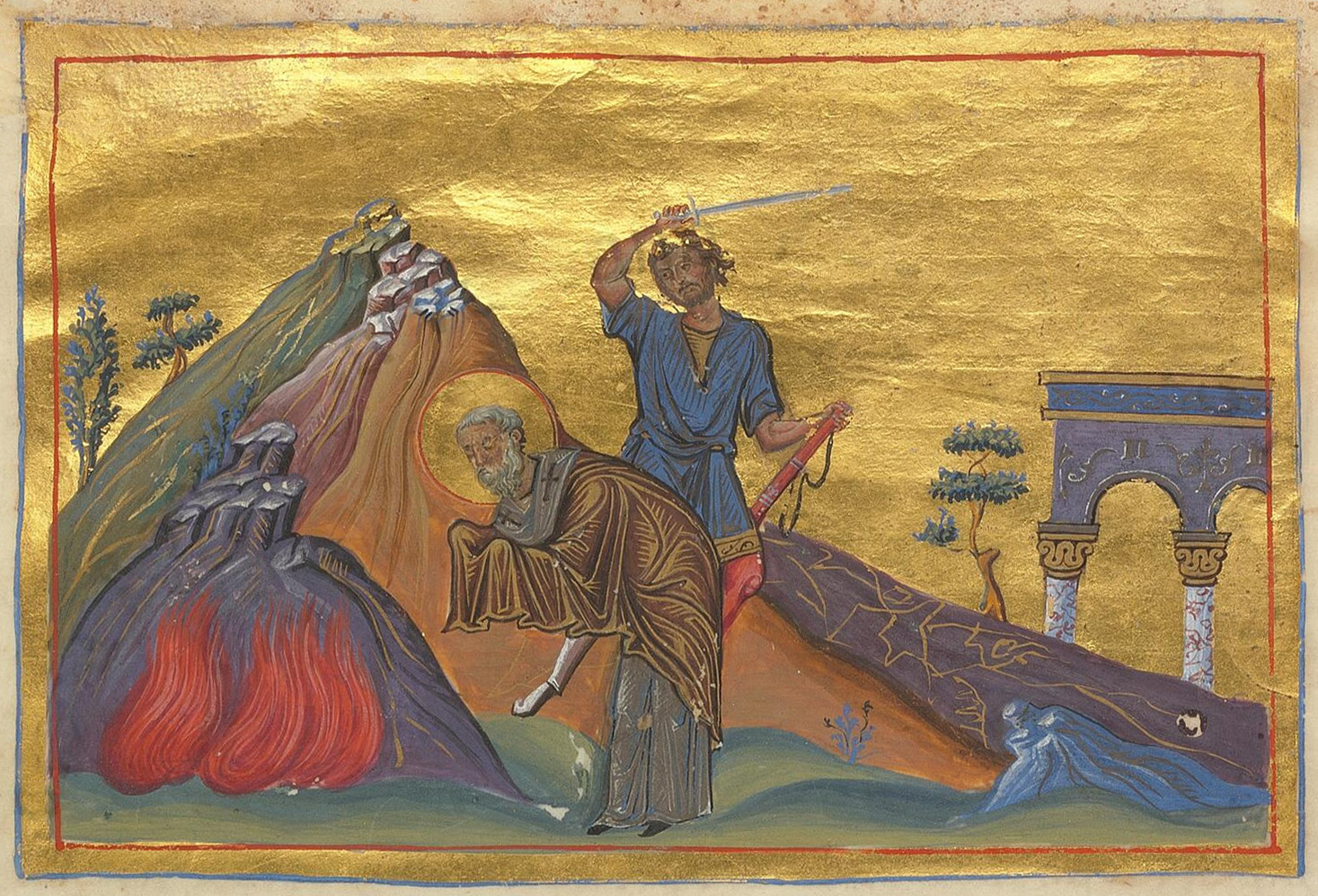 Фока Синопийский Константинополь. 985 г. Миниатюра Минология Василия II. Ватиканская библиотека. Рим.